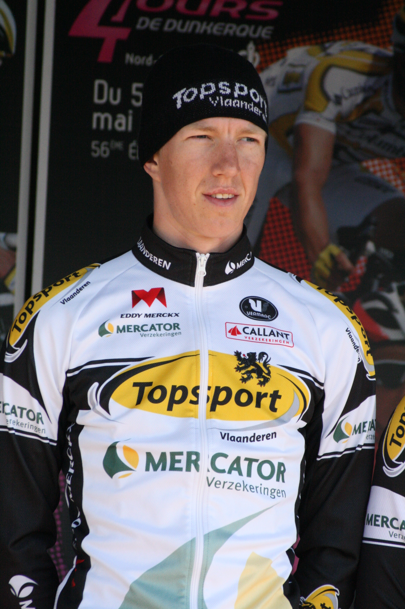 Sep Vanmarcke, lors de la présentation des équipes des 4 jours de Dunkerque 2010